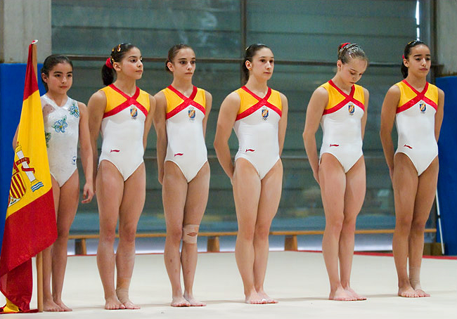 Equipo español de gimnasia artística en el encuentro España - Holanda en Madrid (2004). De izquierda a derecha: abanderada, Laura Campos, Patricia Moreno, Sara Moro, Elena Gómez y Tania Gener.